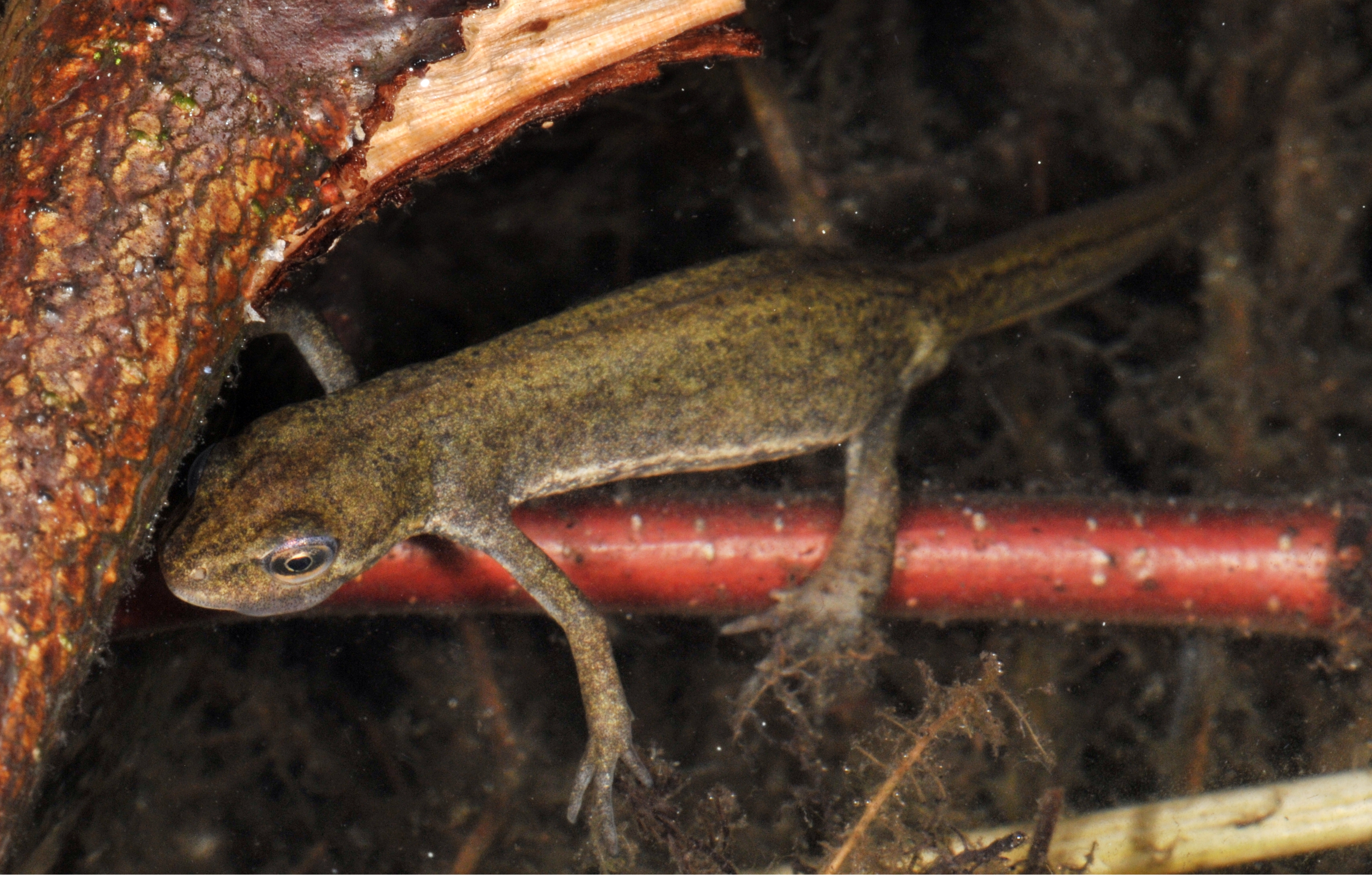 Teichmolch Triturus vulgaris, Schwanheimer Düne, Frankfurt am Main, Hessen, Deutschland